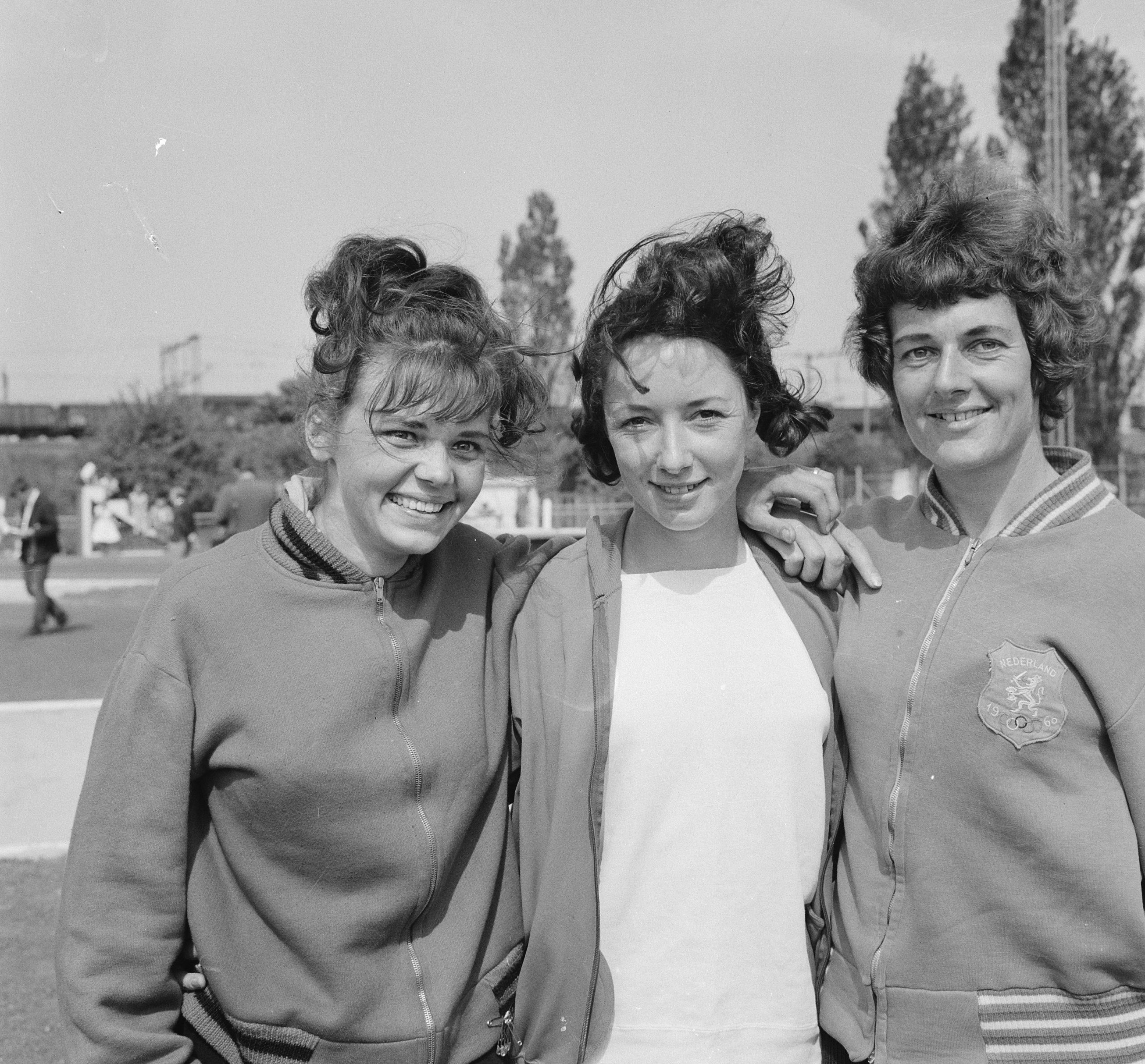 Internationale atletiekwedstrijden, de 400 meter dames v.l.n.r. Hilde Slaman-van Doorn , midden Ann Packer (Engeland) en rechts Gerda Kraan. Datum: 31 mei 1964